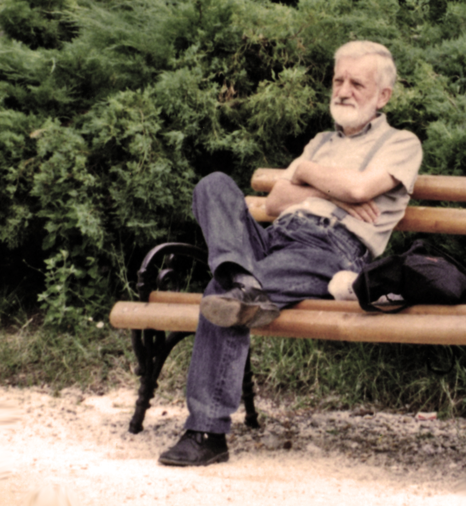 Srpskohrvatski / српскохрватски: portret